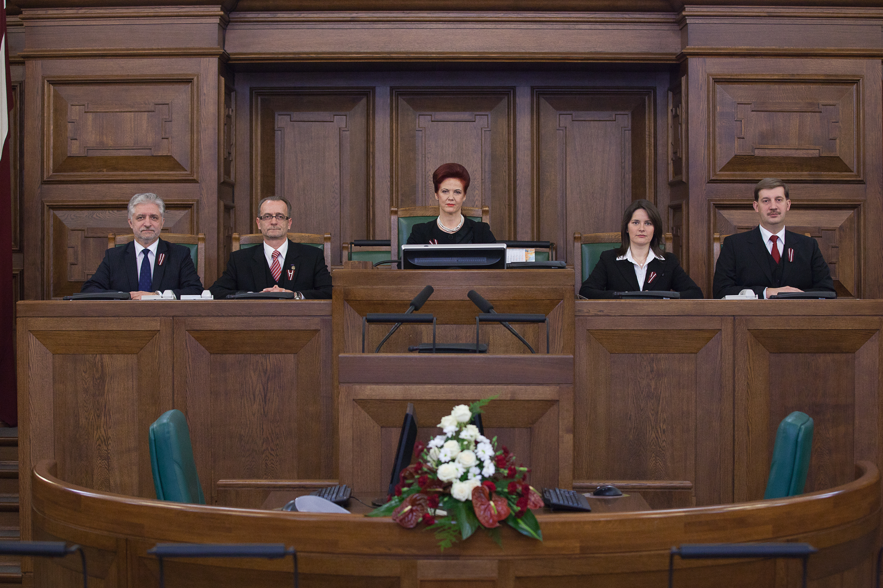 Jānis Vucāns, Dzintars Rasnačs, Solvita Āboltiņa, Inga Bite, Andrejs Klementjevs